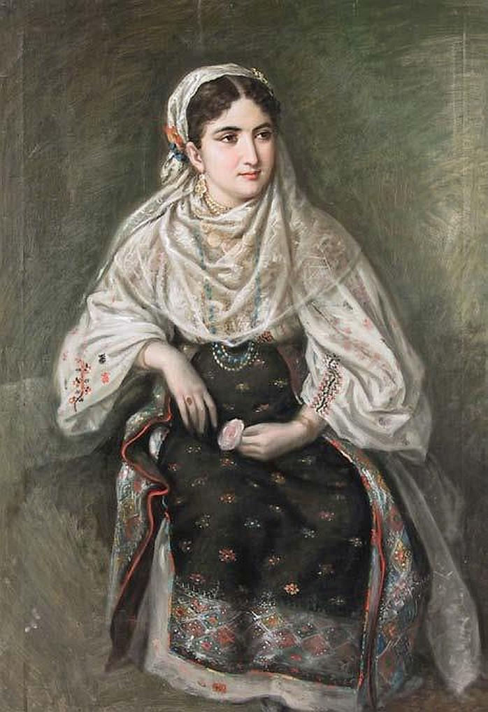 Musceleanca, Muzeul Brukenthal